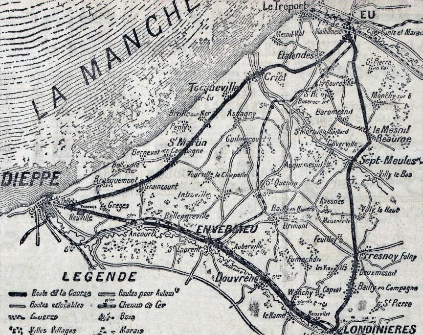 Le circuit de Dieppe en 1912, pour le Grand Prix de l'ACF.